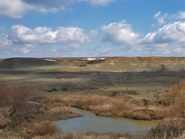 Большой Караман у Советского